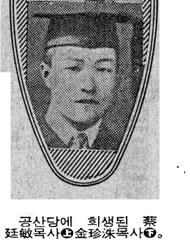 김관주 목사(순교자)